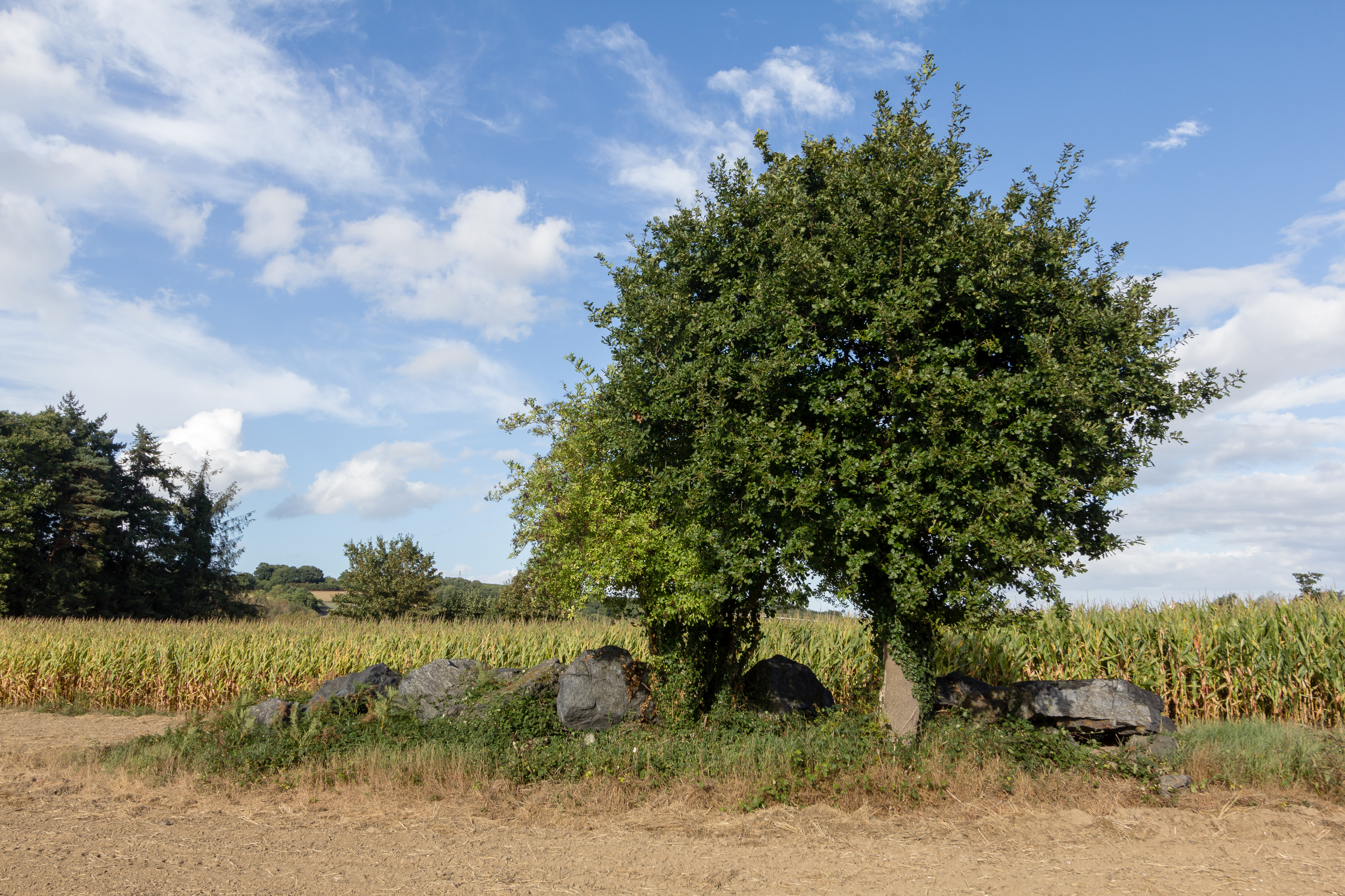 Allée couverte du Petit-Chêne à Plédran (France). Ne doit pas être confondue avec la proche allée couverte de la Roche Camio.